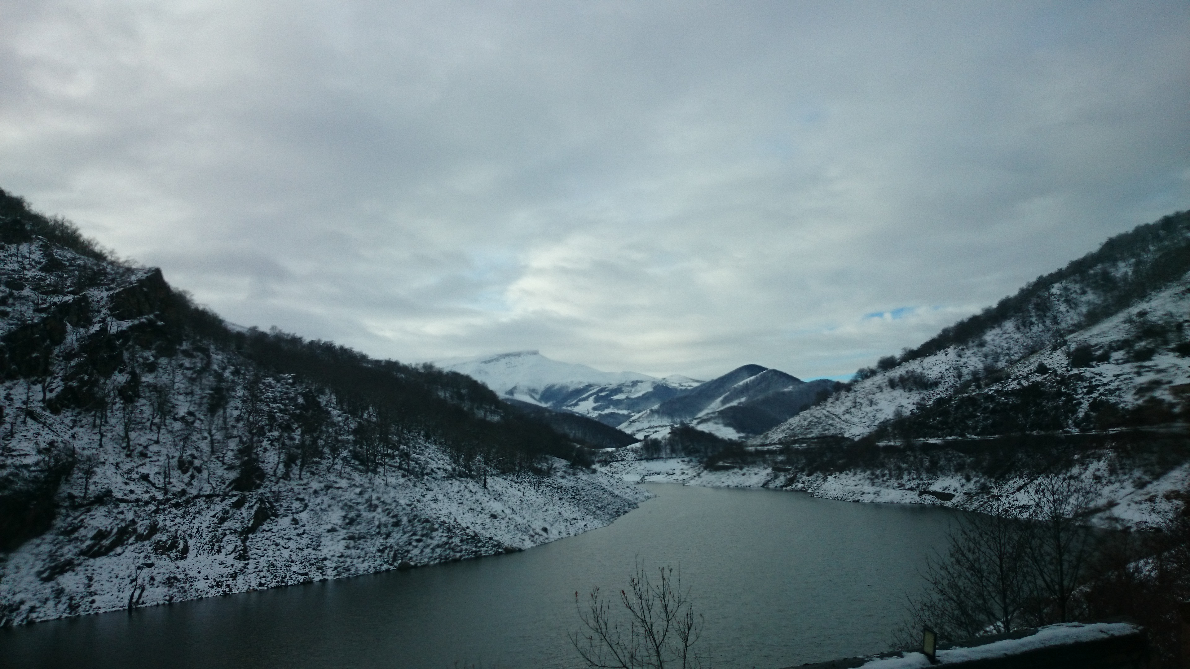 Valles altos del Nansa y Saja y Alto Campoo This is a photography of a Special Area of Conservation in Spain with the ID: ES1300021. Natura2000 entry, EEA entry